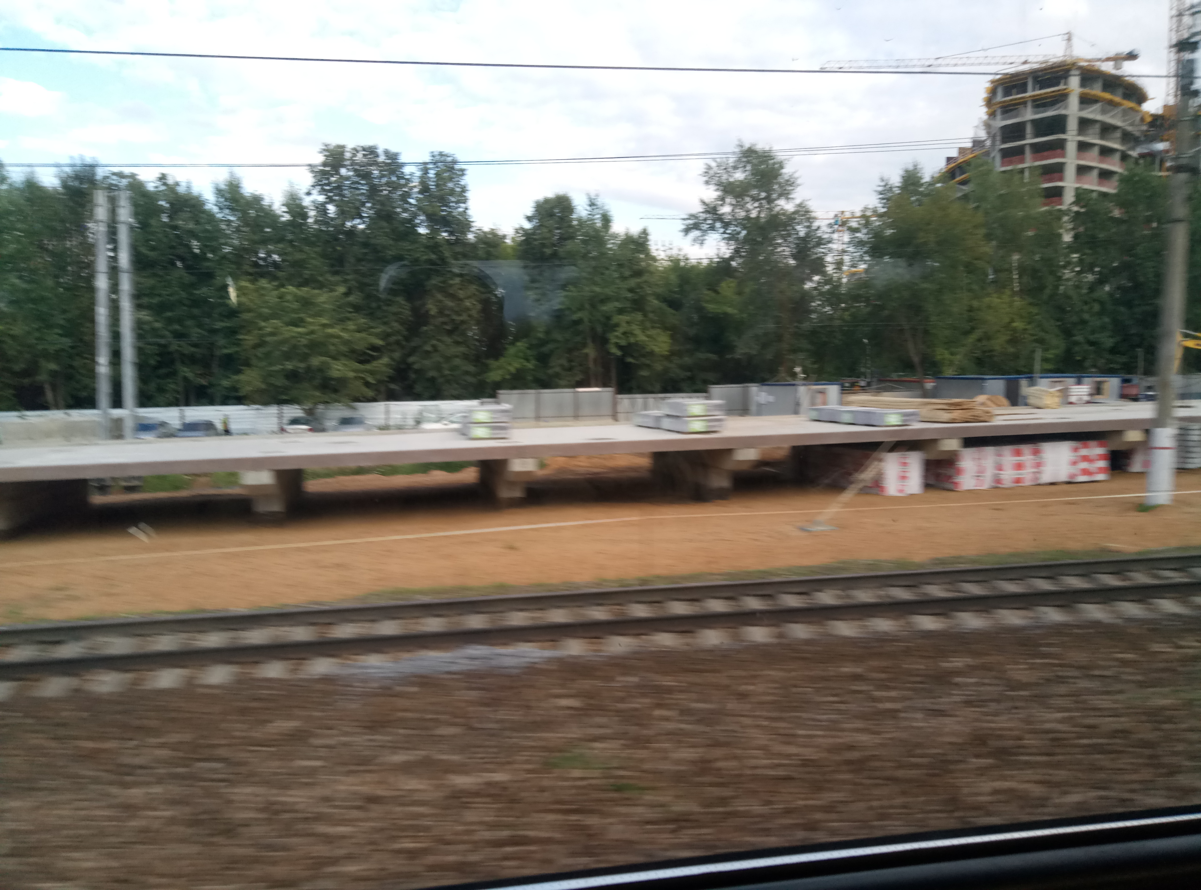 Аминьевская